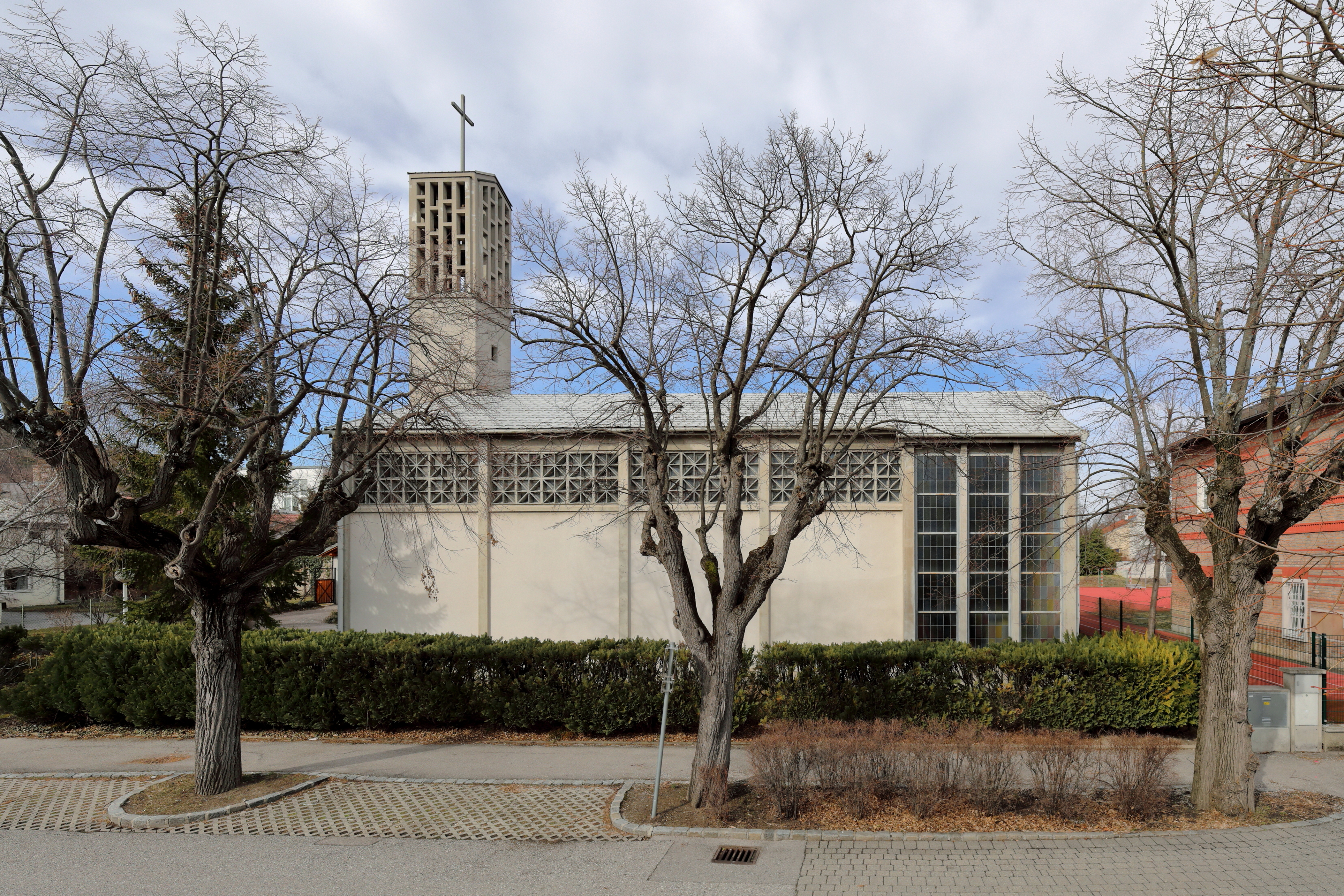 Südostansicht der evangelische Christuskirche in der niederösterreichischen Stadtgemeinde Bad Vöslau. Der Kirchenbau als funktionalistischer Betonbau mit einem Turm wurde 1966 nach den Plänen des Architekten Herbert Fritscher-Notthaft erbaut.